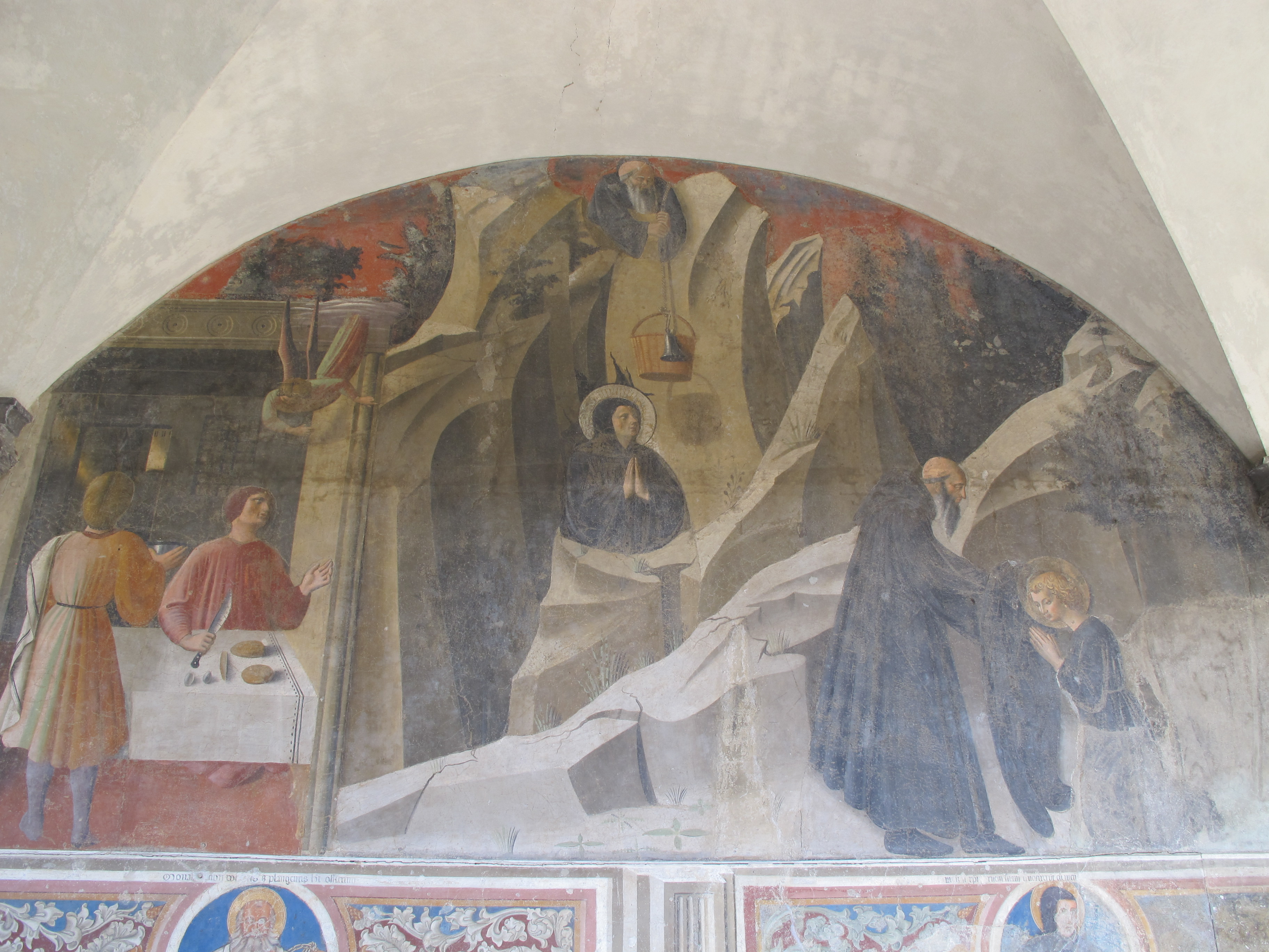 firenze 2011